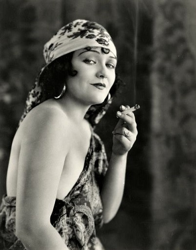 Norma Nichols